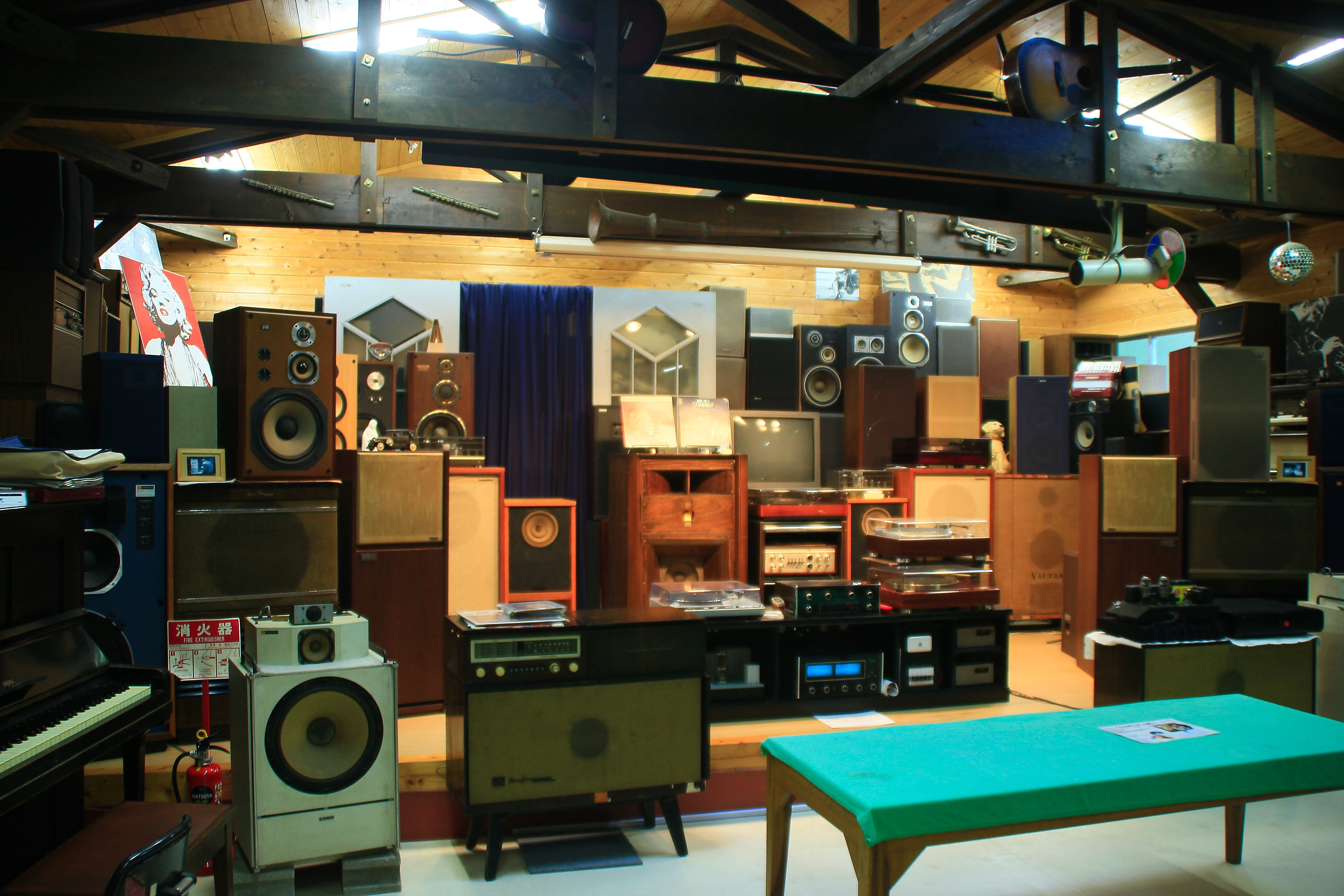 西海市大瀬戸にあるレコード博物館